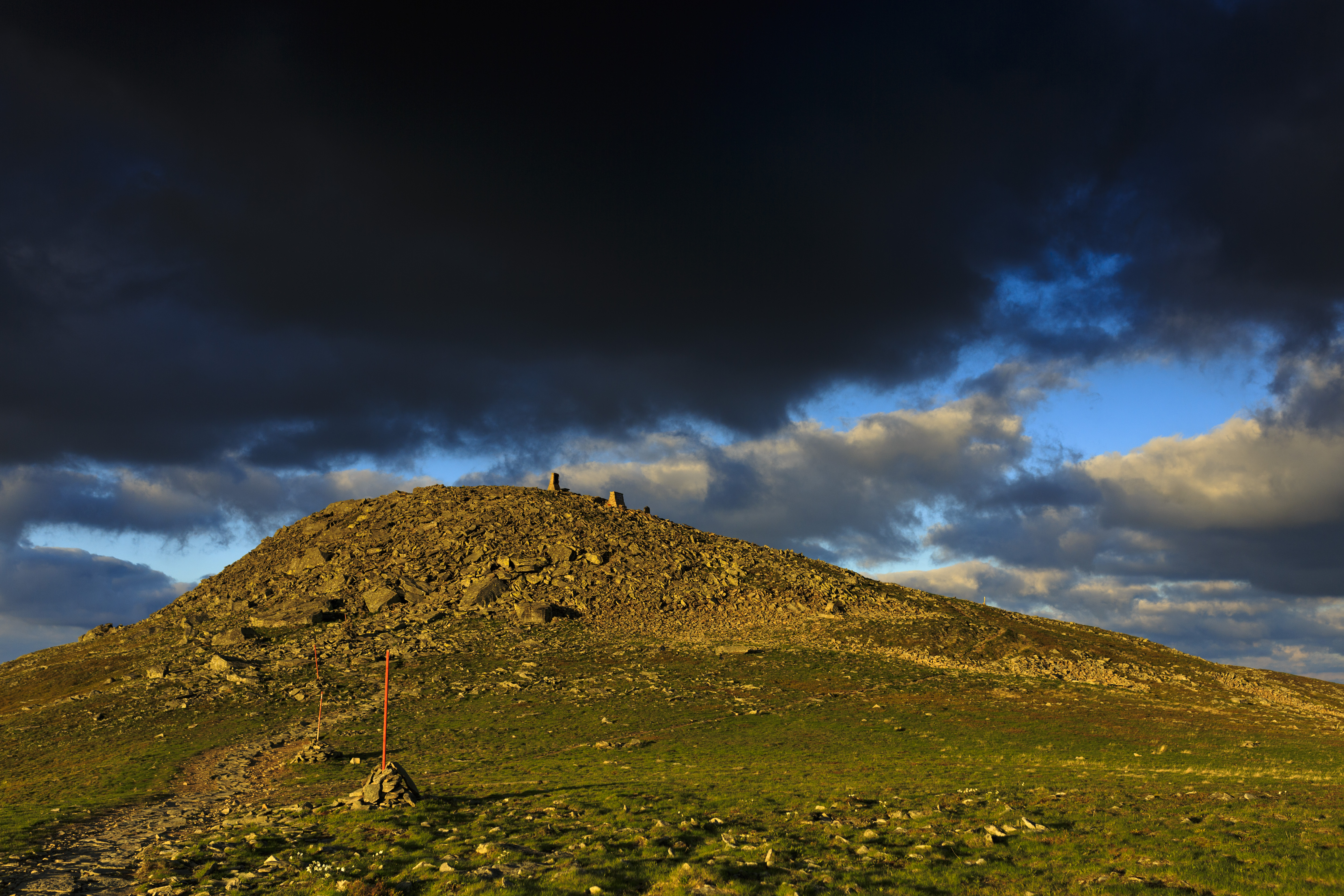 Park narodowy: Babiogórski Park Narodowy This is a photography of protected area with CRFOP ID PL.ZIPOP.1393.PN.19